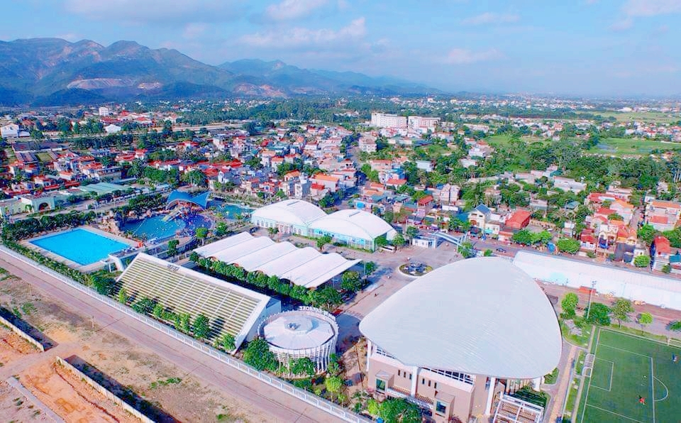 Một góc của phường Mạo Khê, thị xã Đông Triều